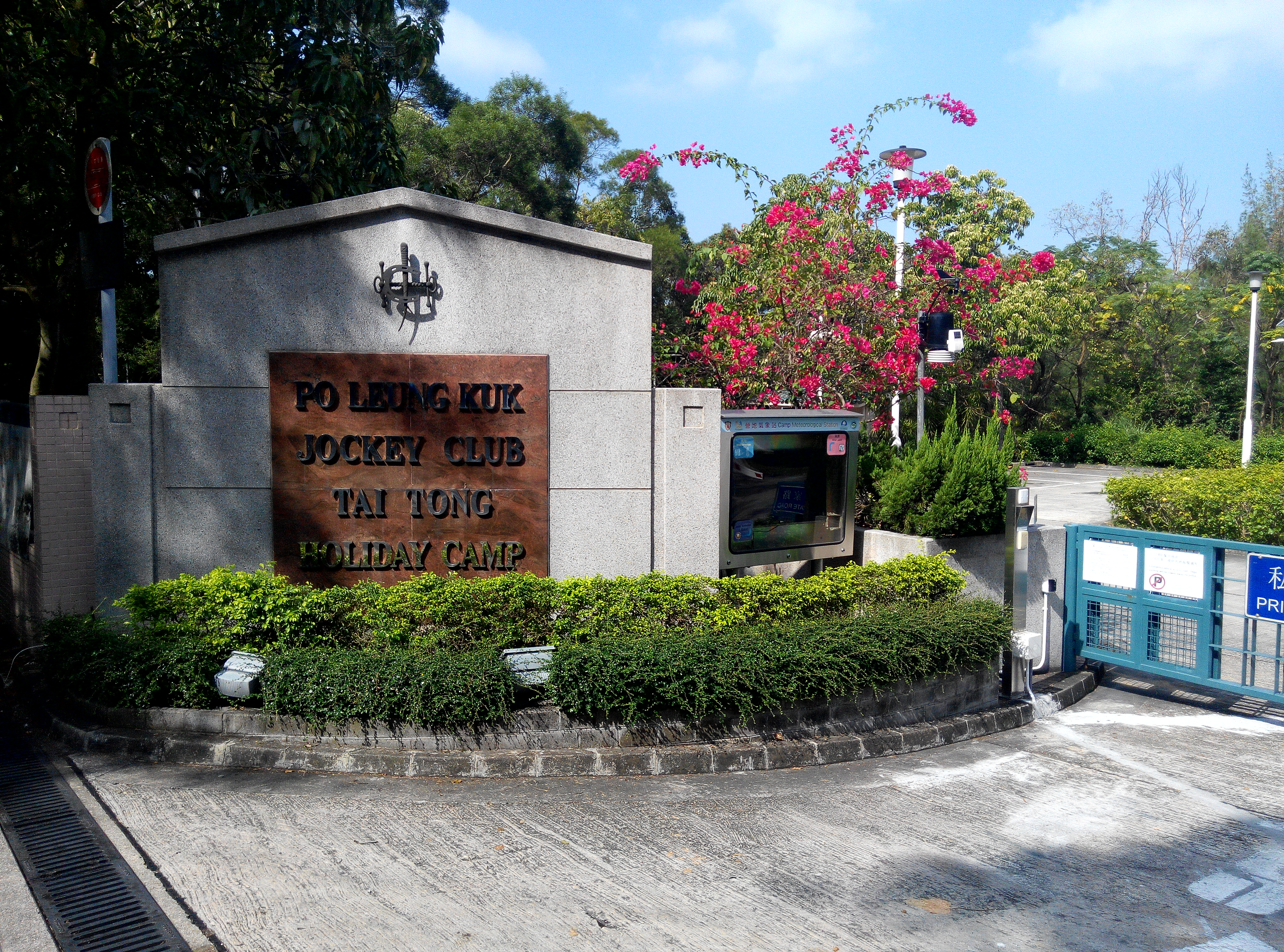 保良局賽馬會大棠渡假村